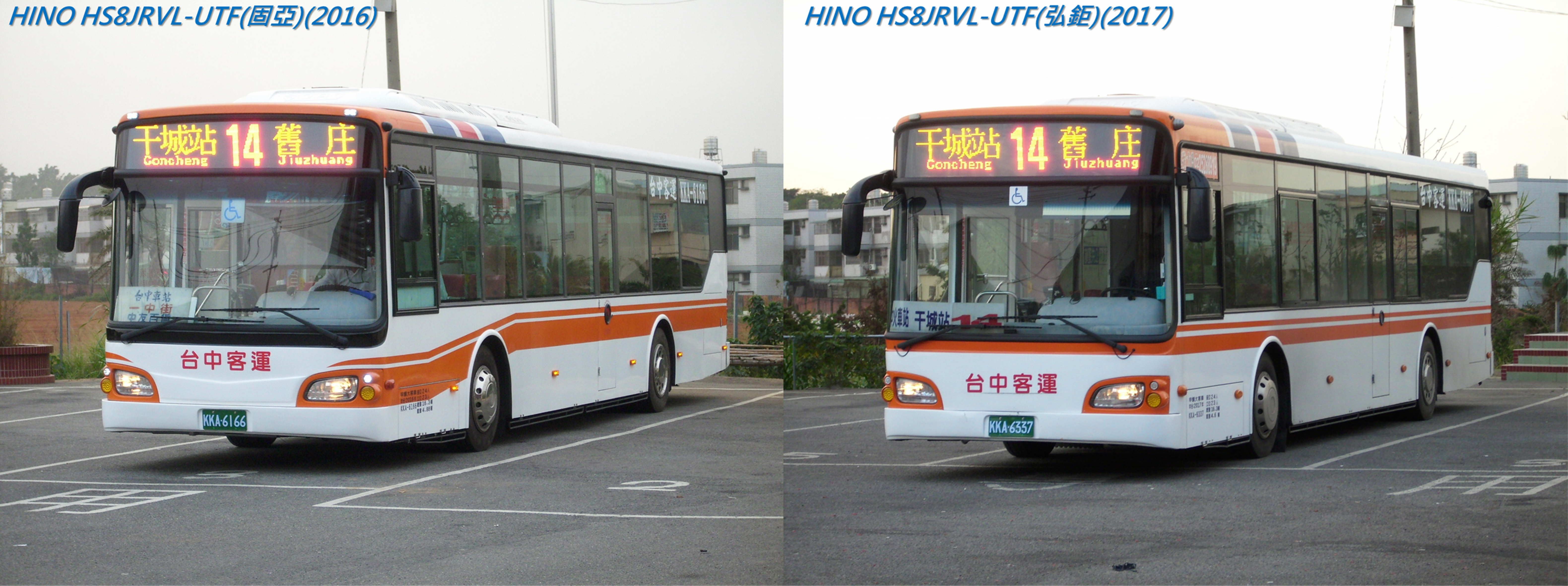 台中客運HINO HS8JRVL-UTF(固亞車體)(2016)與HINO HS8JRVL-UTF(弘鉅車體)(2017)之外觀比較。